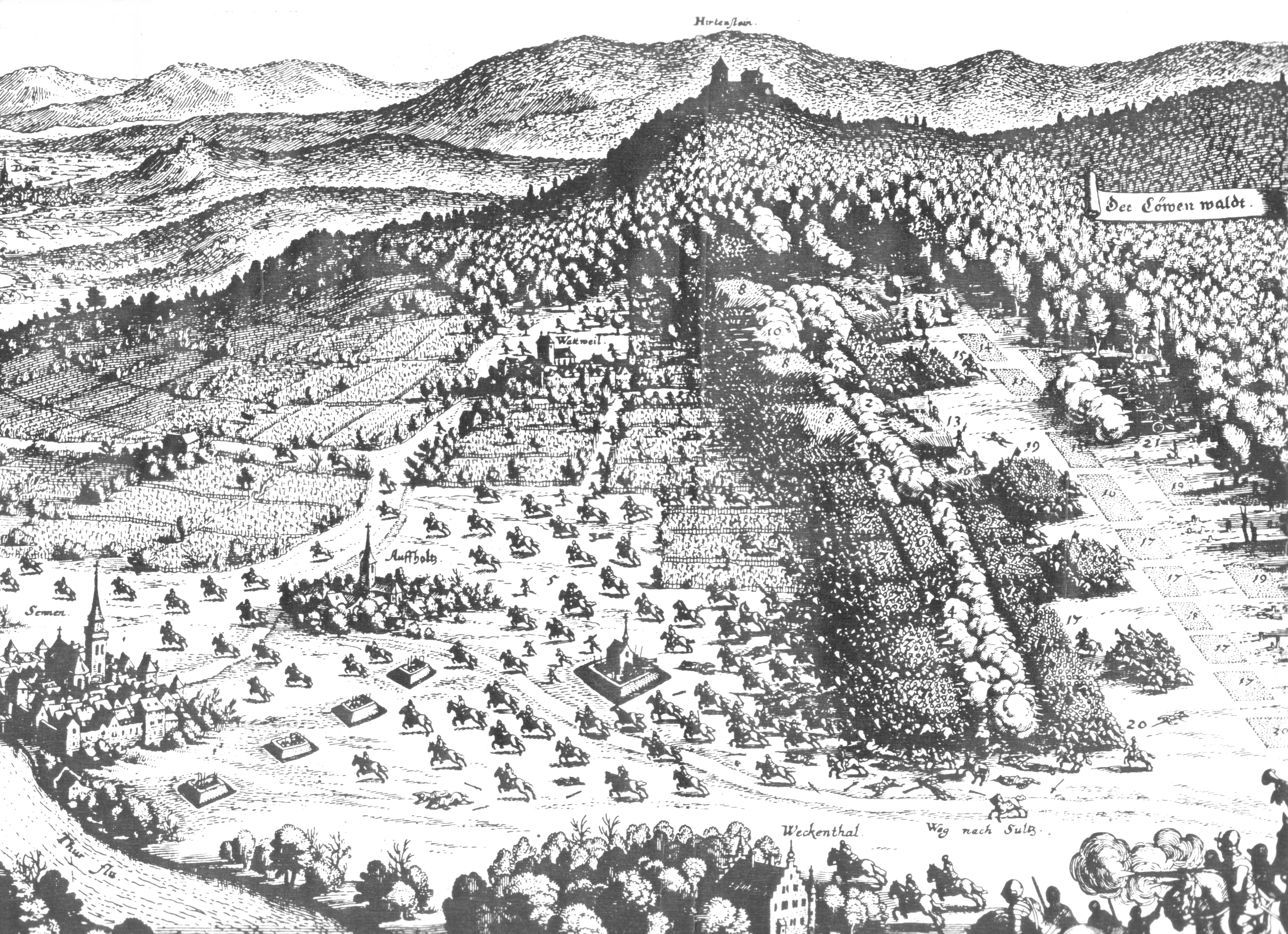 Carte de Merian relatant la bataille de Wattwiller en 1634